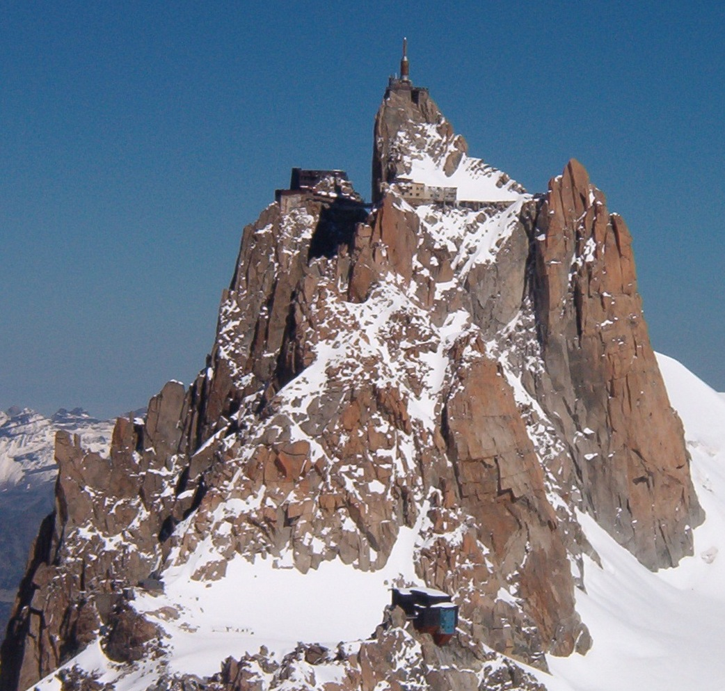 Rifugio des Cosmiques ed Aiuguille di Midi - Massiccio del Monte Bianco - Francia